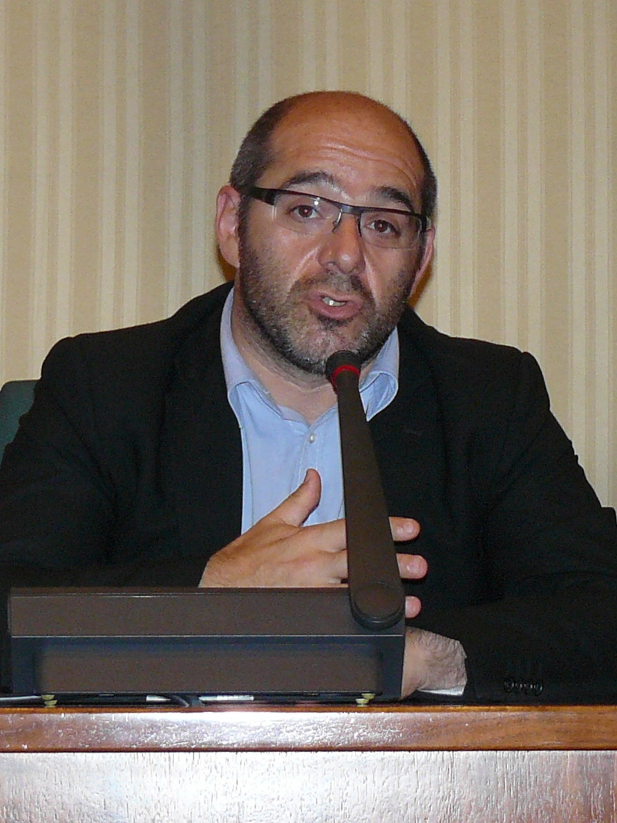 Lluís Guinó presideix la comissió d'estudi del fracking